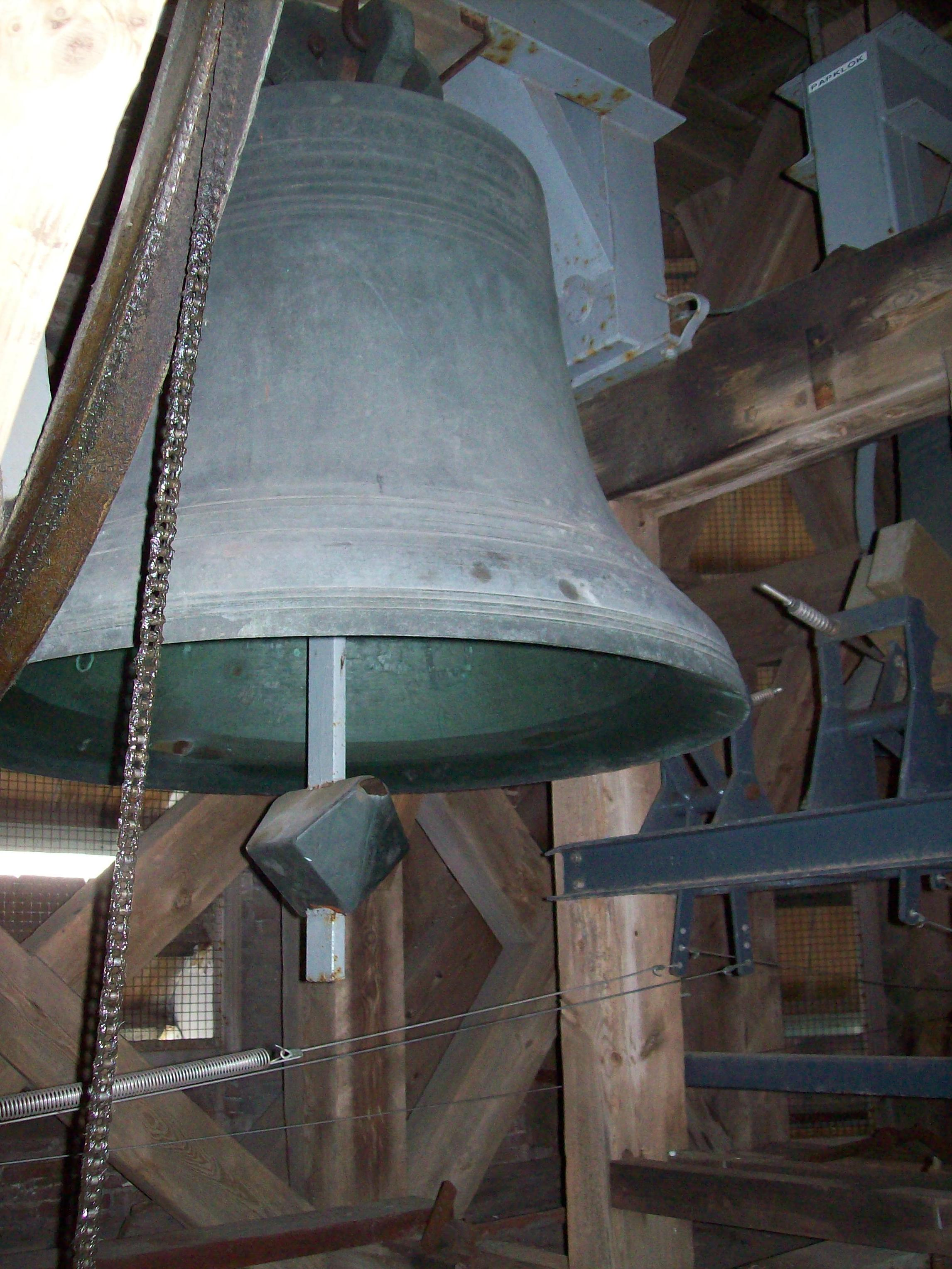 een luidklok in de toren van de grote kerk te nijkerk